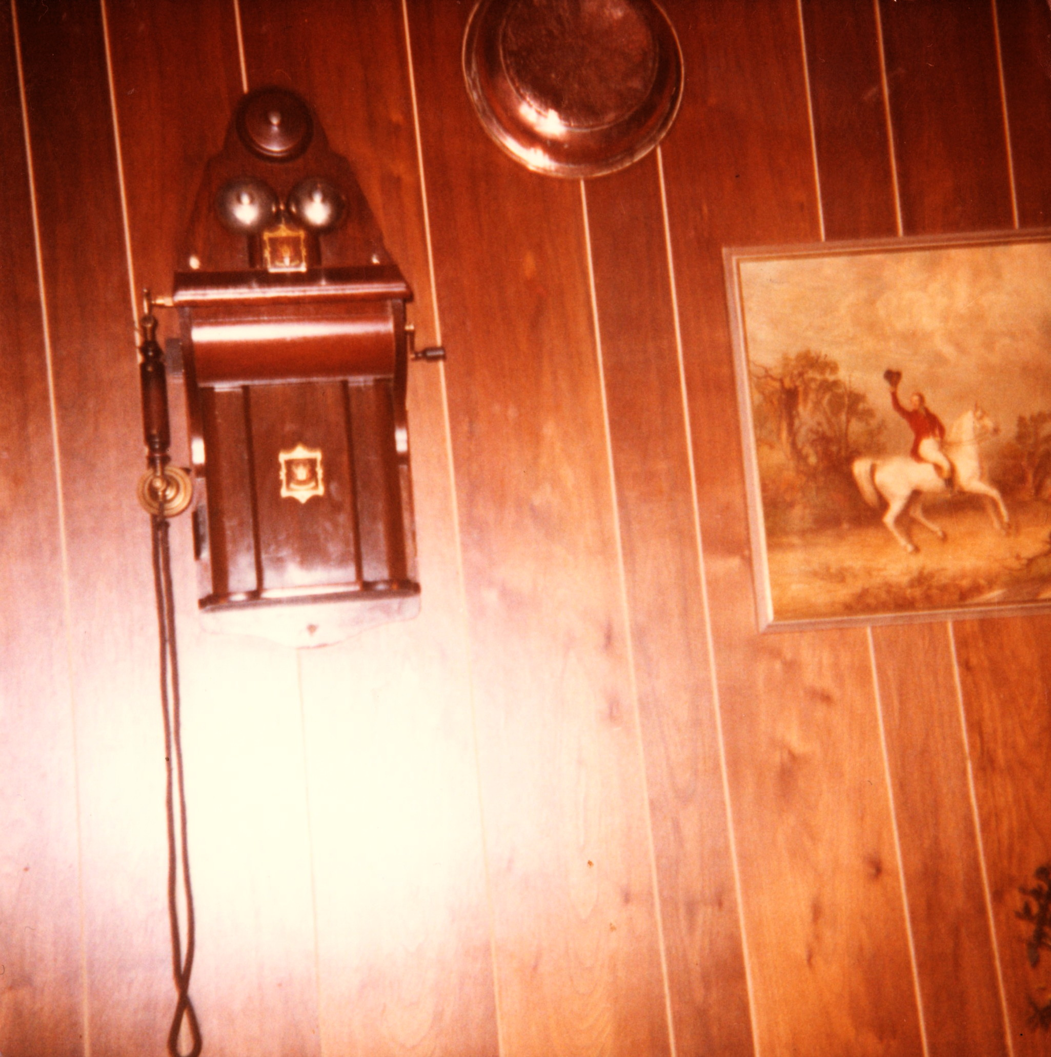 Fungerande manuell vevtelefon på Don Quijote, restaurang på Engelbrektsgatan 22 (1975)